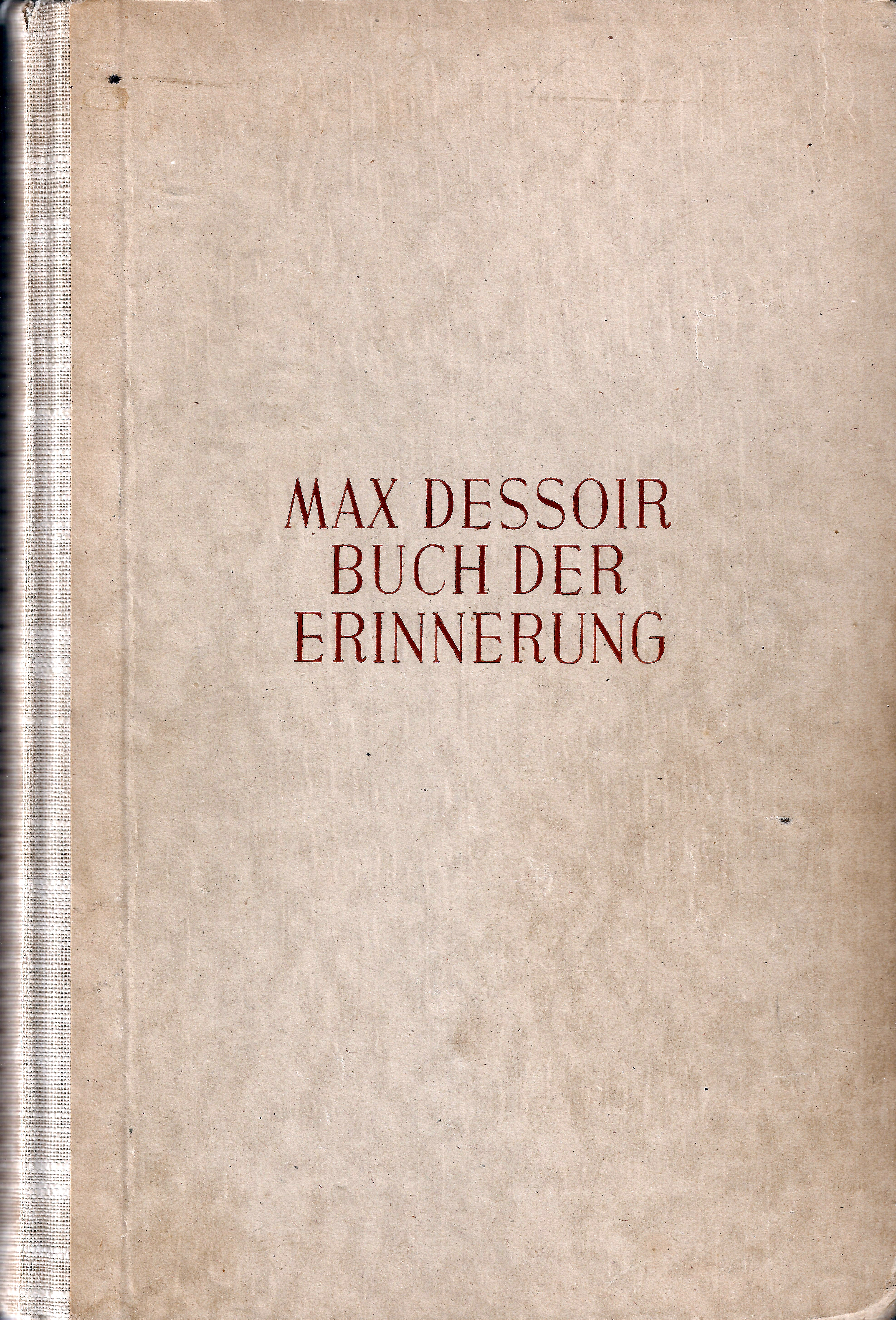 Max Dessoir, Buch der Erinnerung, Umschlagseite, Hardcover, Stuttgart 1947, mit einem Copyright 1946 by Ferdinand Enke, mit einem Vorwort Dessoirs aus Berlin, den 5.4.1942 und einem Nachwort aus Königstein im Taunus vom 25.11.1945